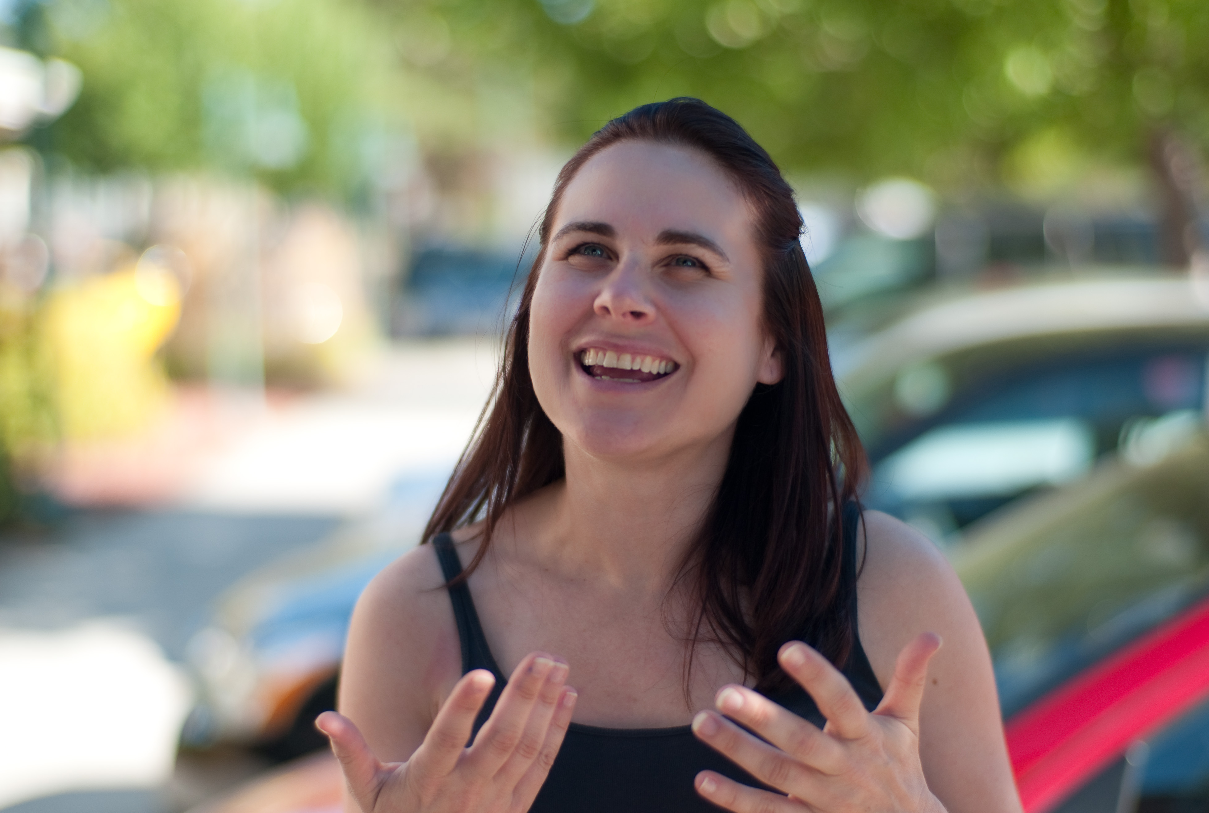 Vanessa Fox